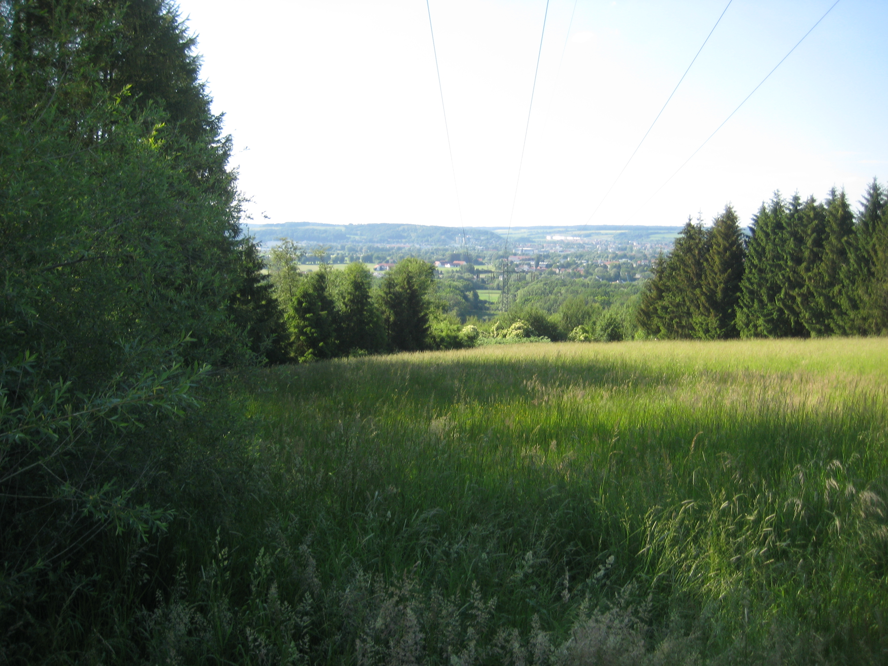 (LSG:BY-LSG-00300.01)_Schutz von Landschaftsteilen der Isar-Hangleiten im Bereich Klausenberg - Ochsenbuckel